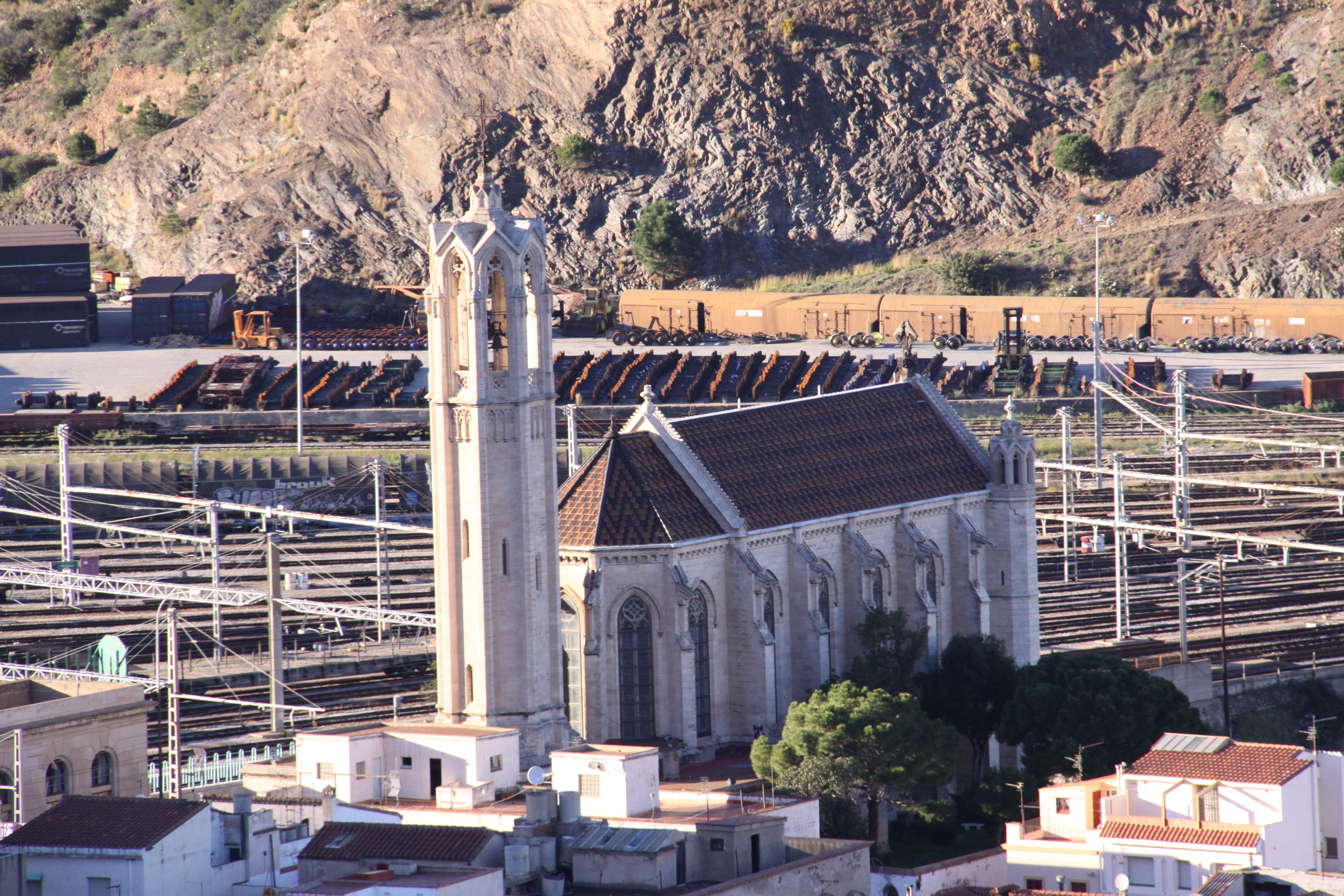 L’ église Santa Maria (Sainte-Marie) de Portbou a été construite en 1878 par la Companyia dels Ferrocarrils de Tarragona a Barcelona i França pour offrir un service religieux à son personnel. Elle est de style néo gothique. On peut constater que cette église est en deux parties: le clocher est constitué par une tour hexagonale séparée du bâtiment proprement dit de l’ église. En arrière plan, au-delà des voies ferrées, sont stockés des essieux. Ce matériel est nécessaire car l’ écartement des rails est différent sur les lignes ferroviaires Perpignan-Cerbère (voie standard, 1435 mm) et Portbou-Barcelone (voie large, 1668 mm). Les trains qui passent la frontière doivent avoir, ainsi, leurs essieux changés s’ils ne sont pas équipés de bogies adaptables aux deux écartements. Portbou, Catalogne, Espagne.